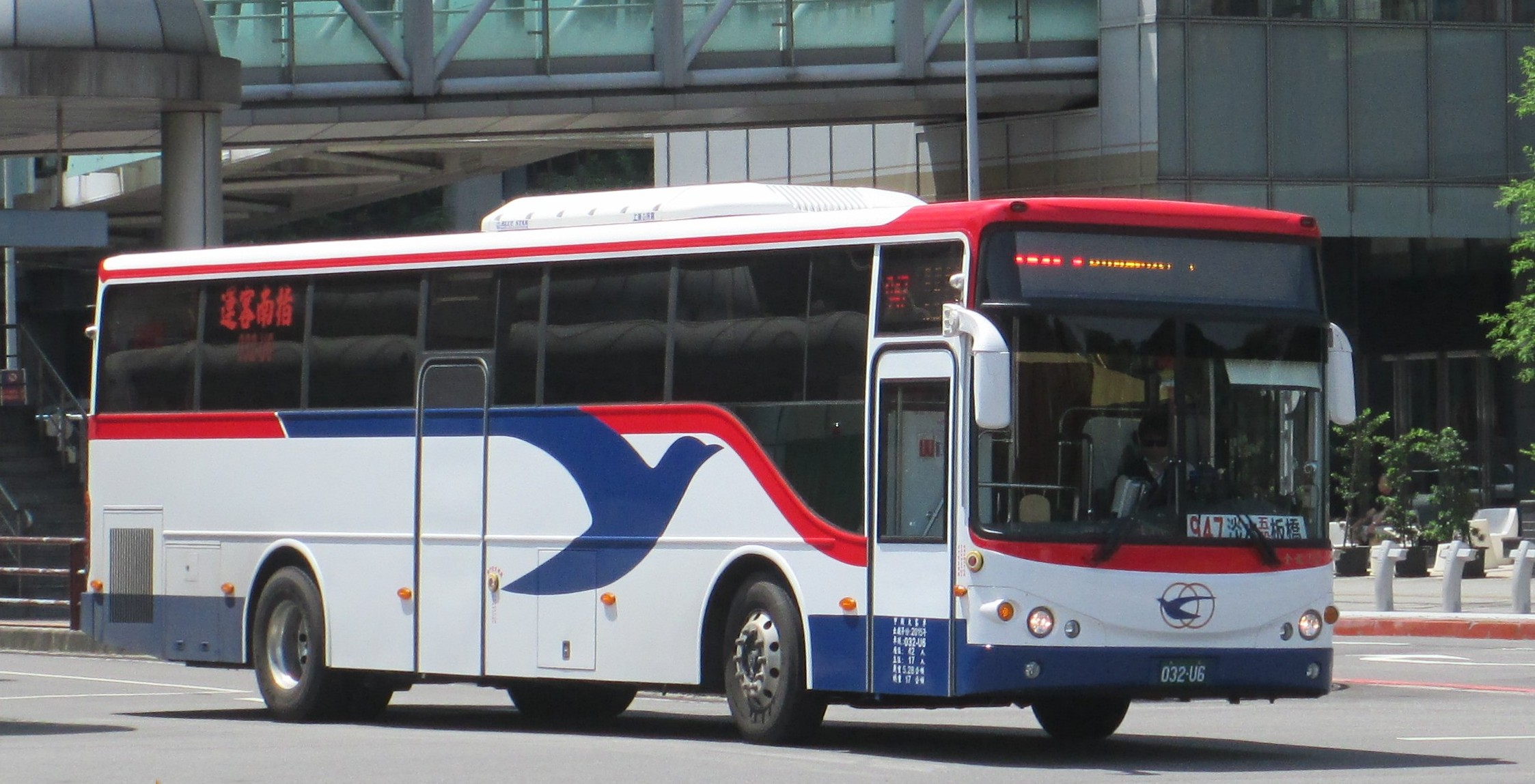 指南客運雙門金龍高巴032-U6